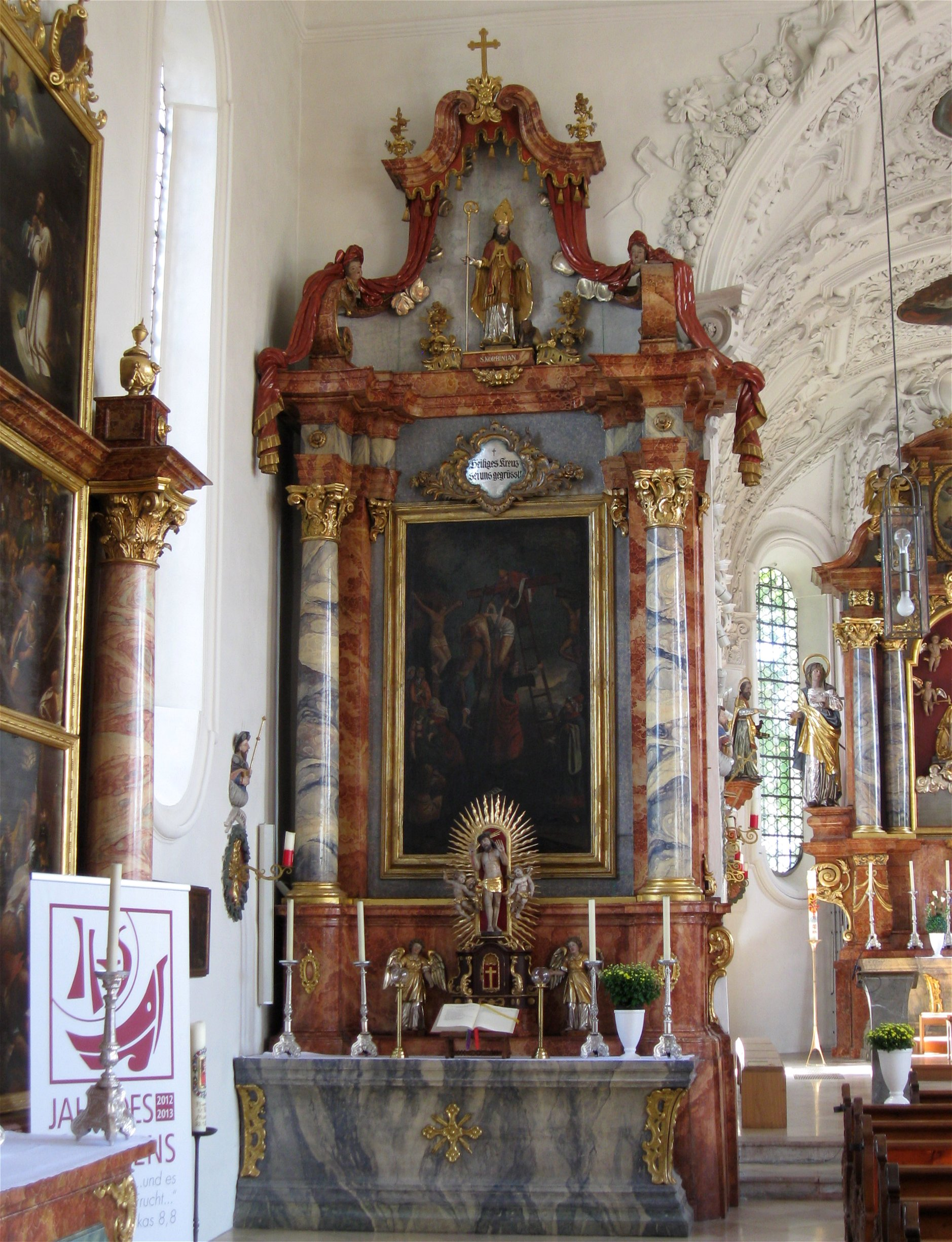 Zugspitzstraße 13. Kath. Wallfahrtskirche Hl. Blut am Wasen, Saalbau, Chor im Kern spätgotisch, 1686/87 barockisiert, Langhaus 1610/11, dem Chor um 1690 angeglichen; mit Ausstattung; Brunnenkapelle, gen. "Der Brunn", Achteckbau mit schindelgedeckter Laternenkuppel, Johann Mayr d.Ä. von der Hausstatt, Ende 17. Jh.; mit Ausstattung; nördlich neben der Kirche.